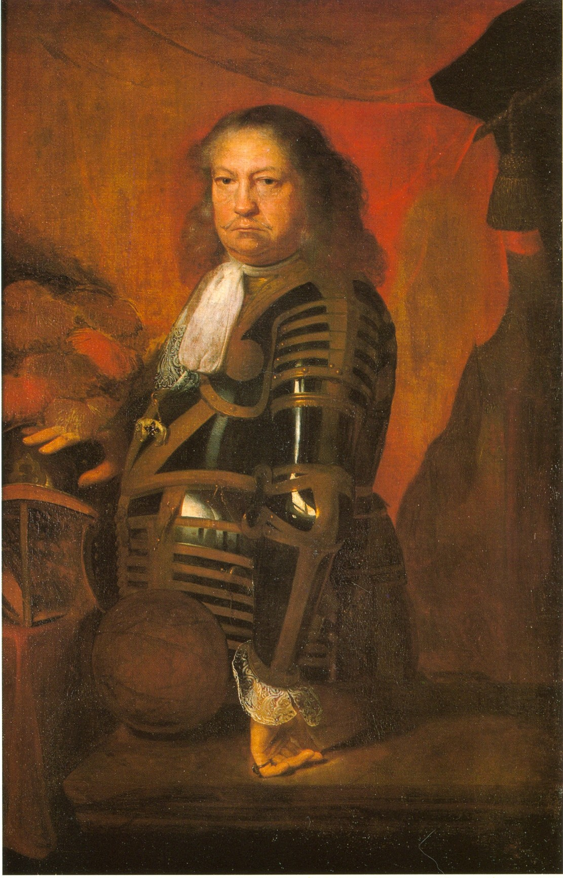 Duke Eberhard III of Württemberg (1633-1674)